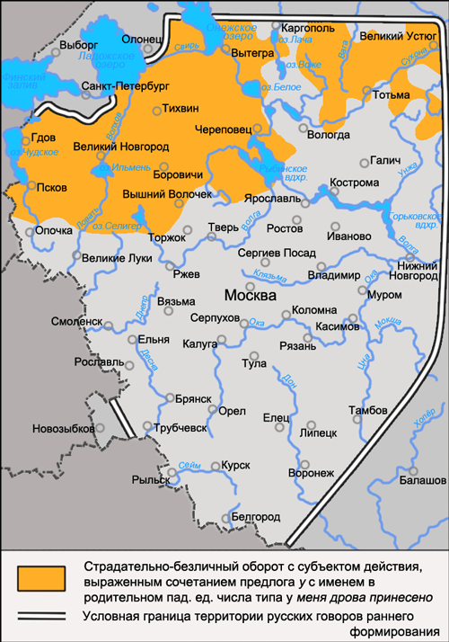 Карта распространения диалектного явления русского языка в области синтаксиса: страдательно-безличный оборот с субъектом действия, выраженным сочетанием предлога у с именем в родительном пад. ед. числа, типа у меня дрова принесено. Источники: Язык русской деревни. Диалектологический атлас. — Карта 24. Перфект в русских говорах. Захарова К. Ф., Орлова В. Г. Диалектное членение русского языка — 2-е изд. — М.: Едиториал УРСС, 2004. — ISBN 5-354-00917-0, с. 88.